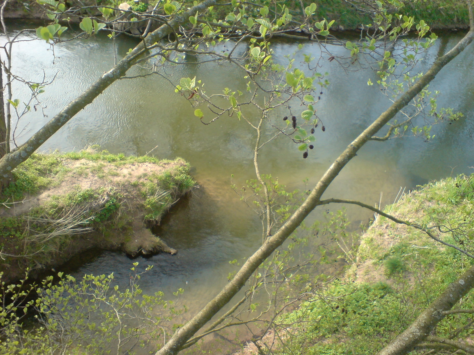 Mündung der Garte in die noch bescheidene Leine südlich von Göttingen